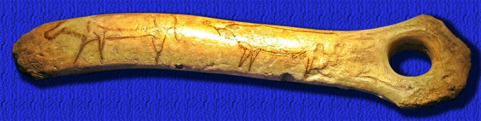 Eiszeitliche Funde: Knochenwerkzeug zur Glättung von Speeren aus Rentierknochen, geschnitzt aus Gagat. Archäologisches Landesmuseum Konstanz